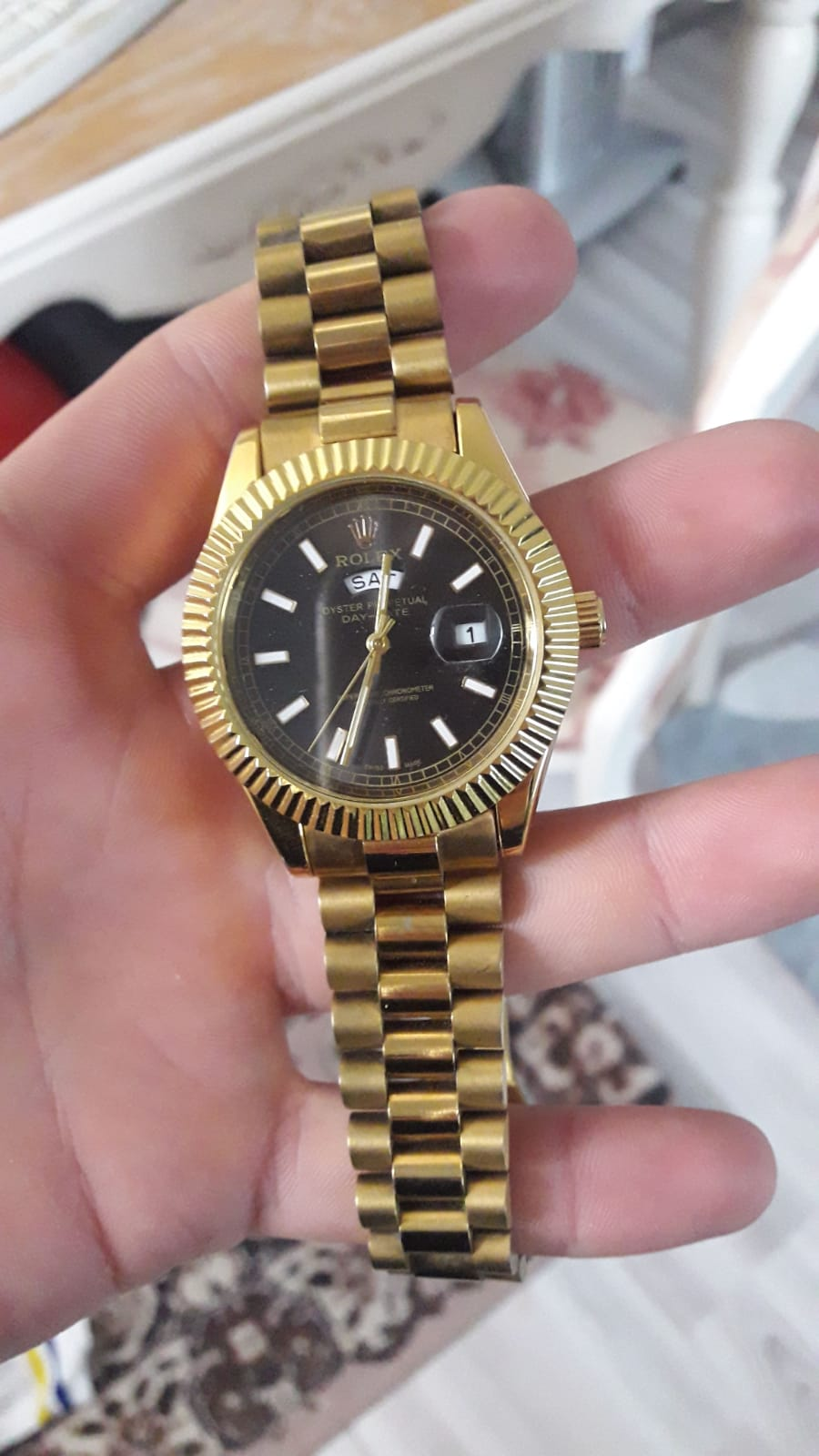 Rolex saat